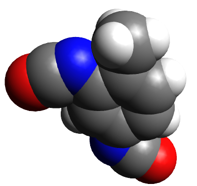 Estructura 3D de esferas de Van der Vaals del isómero 2,4-TDI